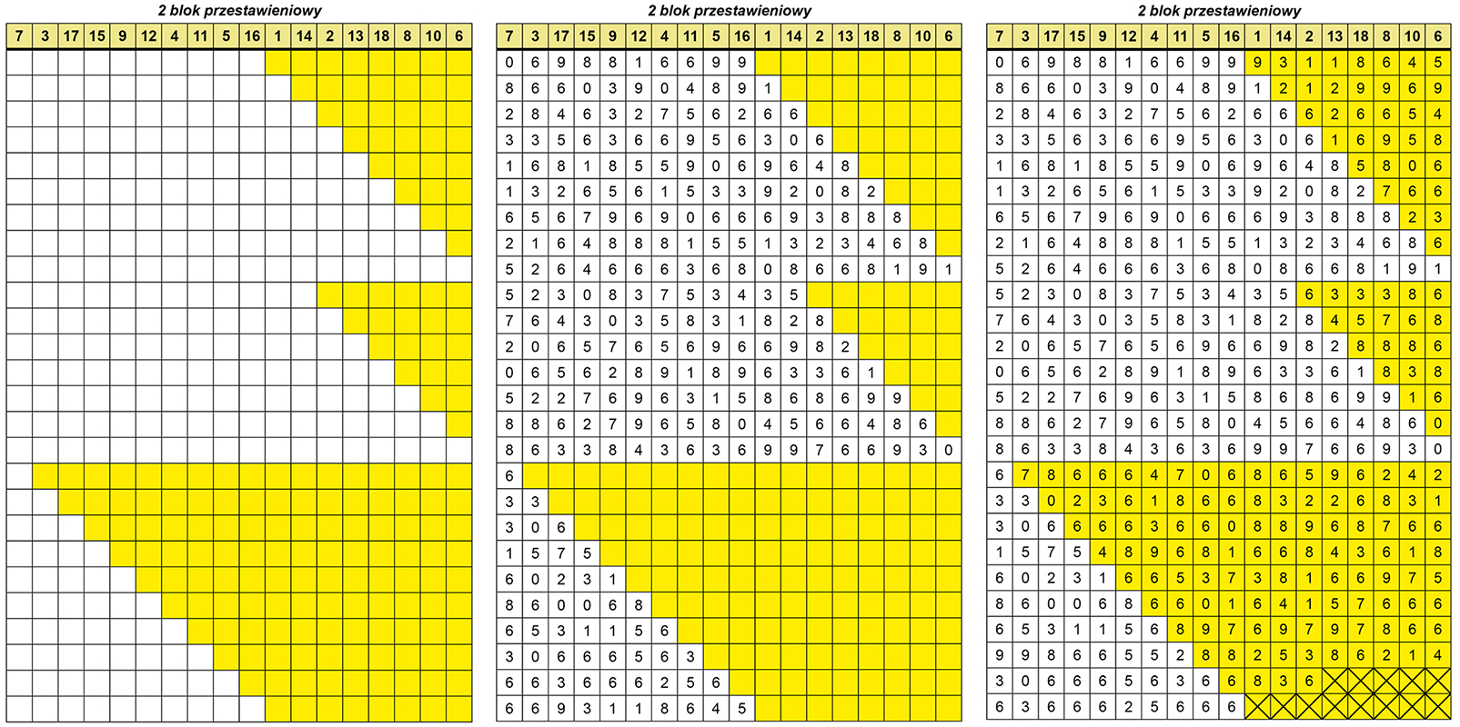 Szyfrowanie szyfrem VIC – drugi blok przestawień, etapy wypełniania